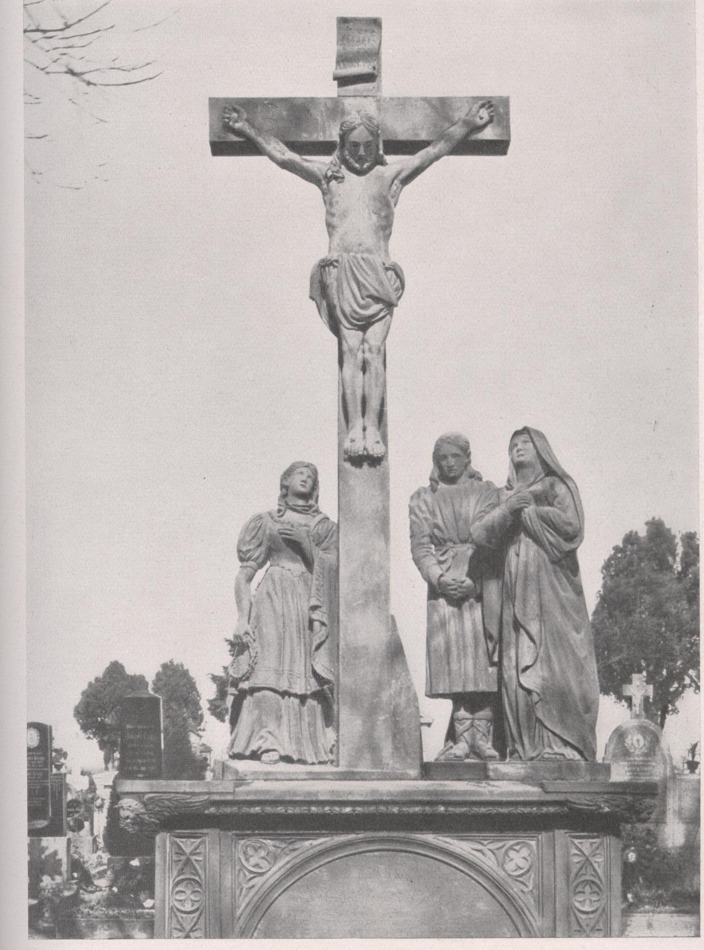 Bernhard Wüschmitt deutscher Priester und Bildhauer, Kreuzigungsgruppe Hagenbach